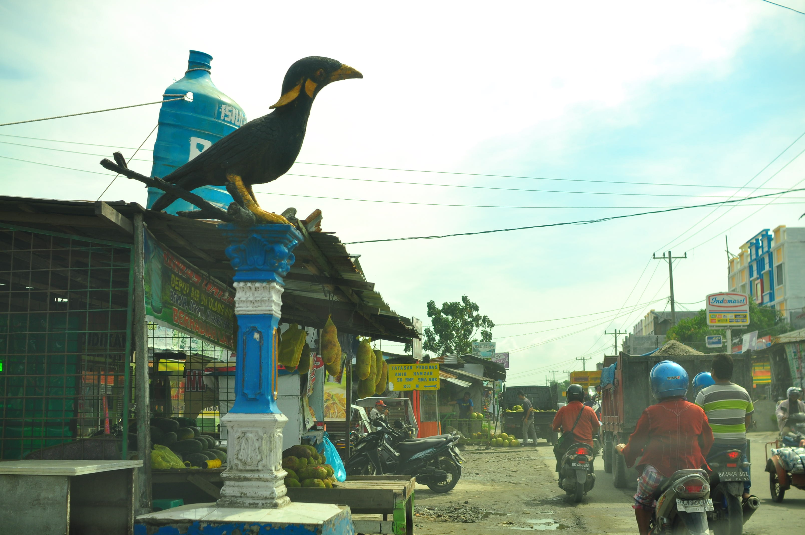 Beo deli serdang di simpang Beo